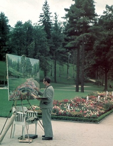 Kunstmaler Knothe im Kurpark Bad Elster hinter der Wandelhalle